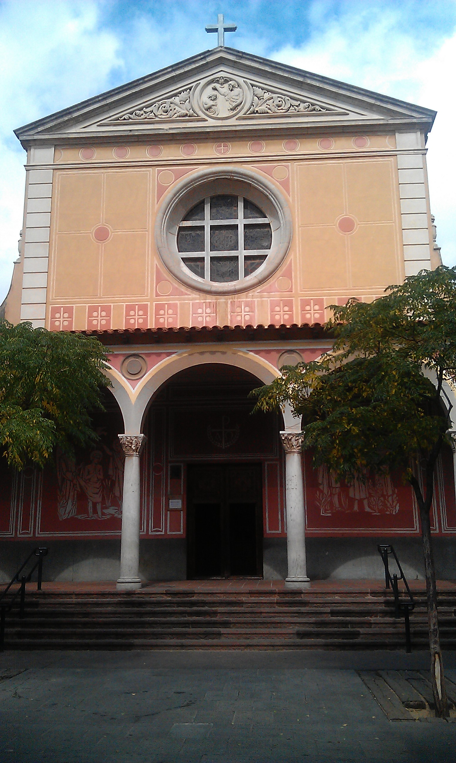 Església parroquial de Sant Joan (Viladecans)